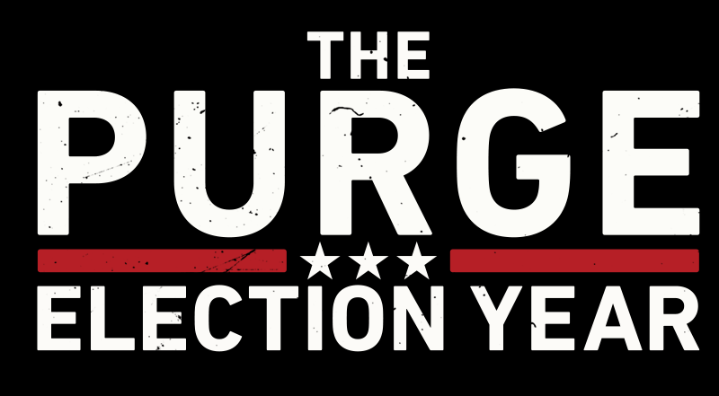 Logo des Films The Purge: Election Year (2016).